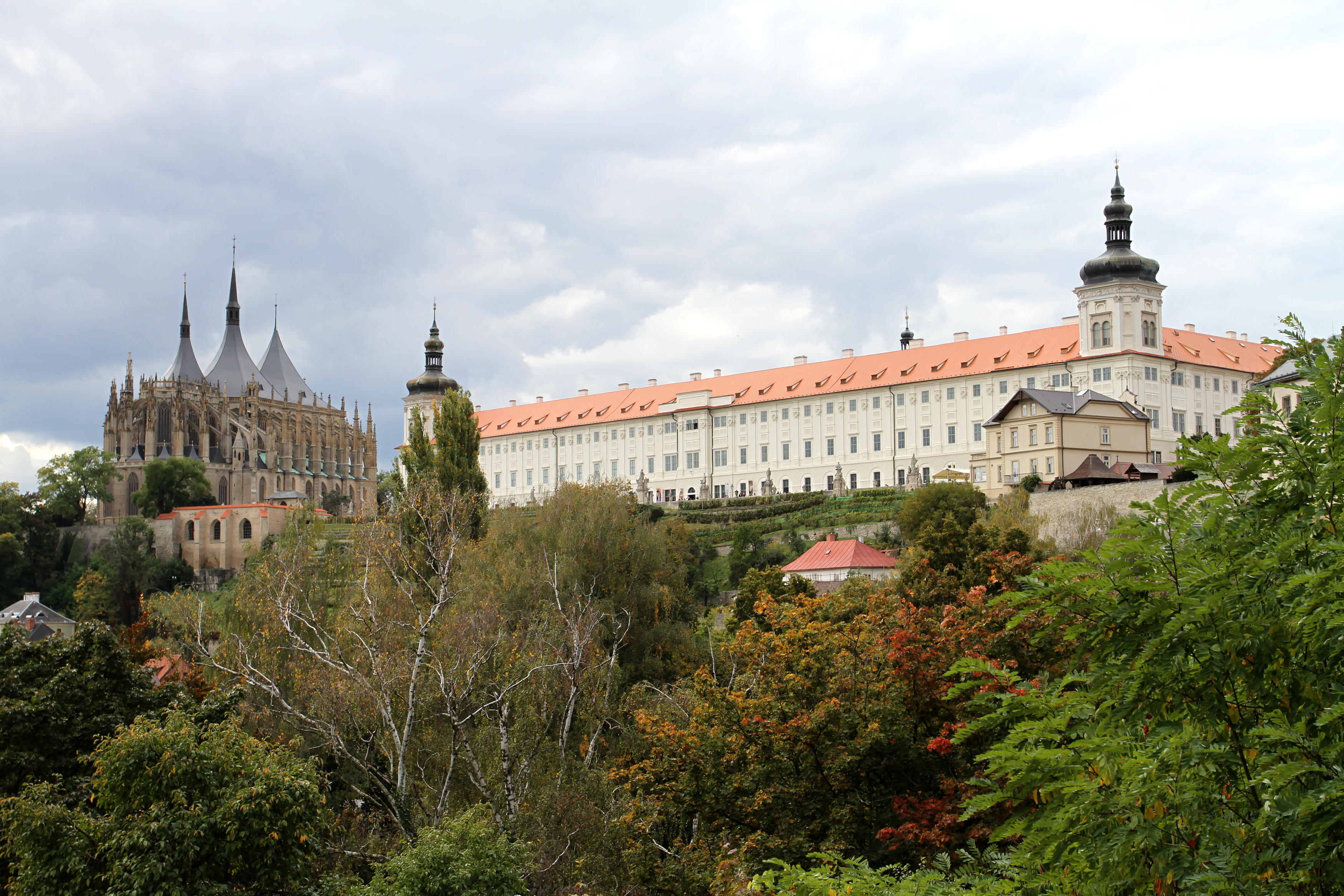 Kolej jezuitská (Kutná Hora), Barborská, čp. 51, 52, 53 a 54 51/24, Kutná Hora